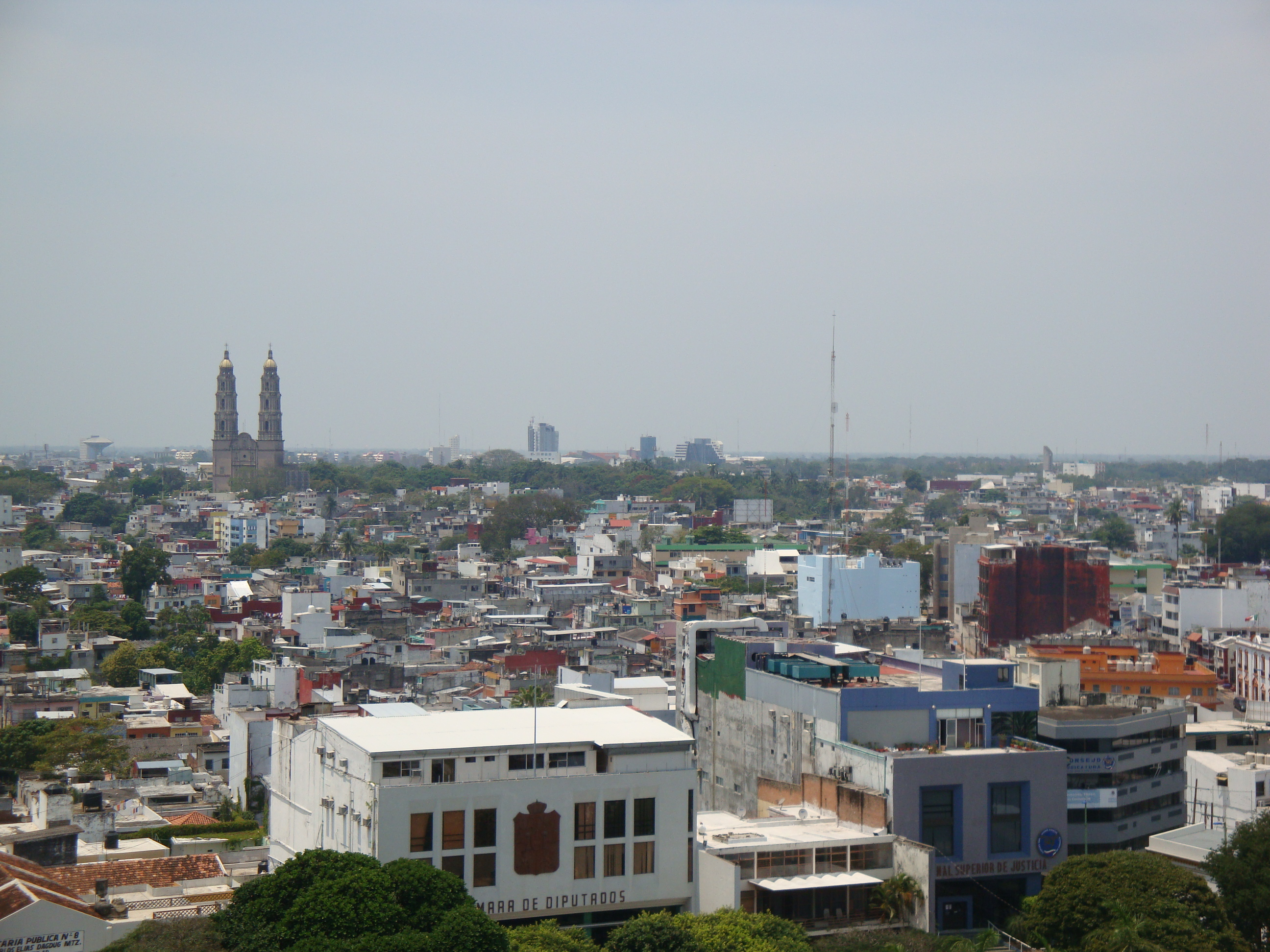 Panorámica poniente de la Ciudad de Villahermosa, Tabasco, México. DESDE la "Torre del Caballero".